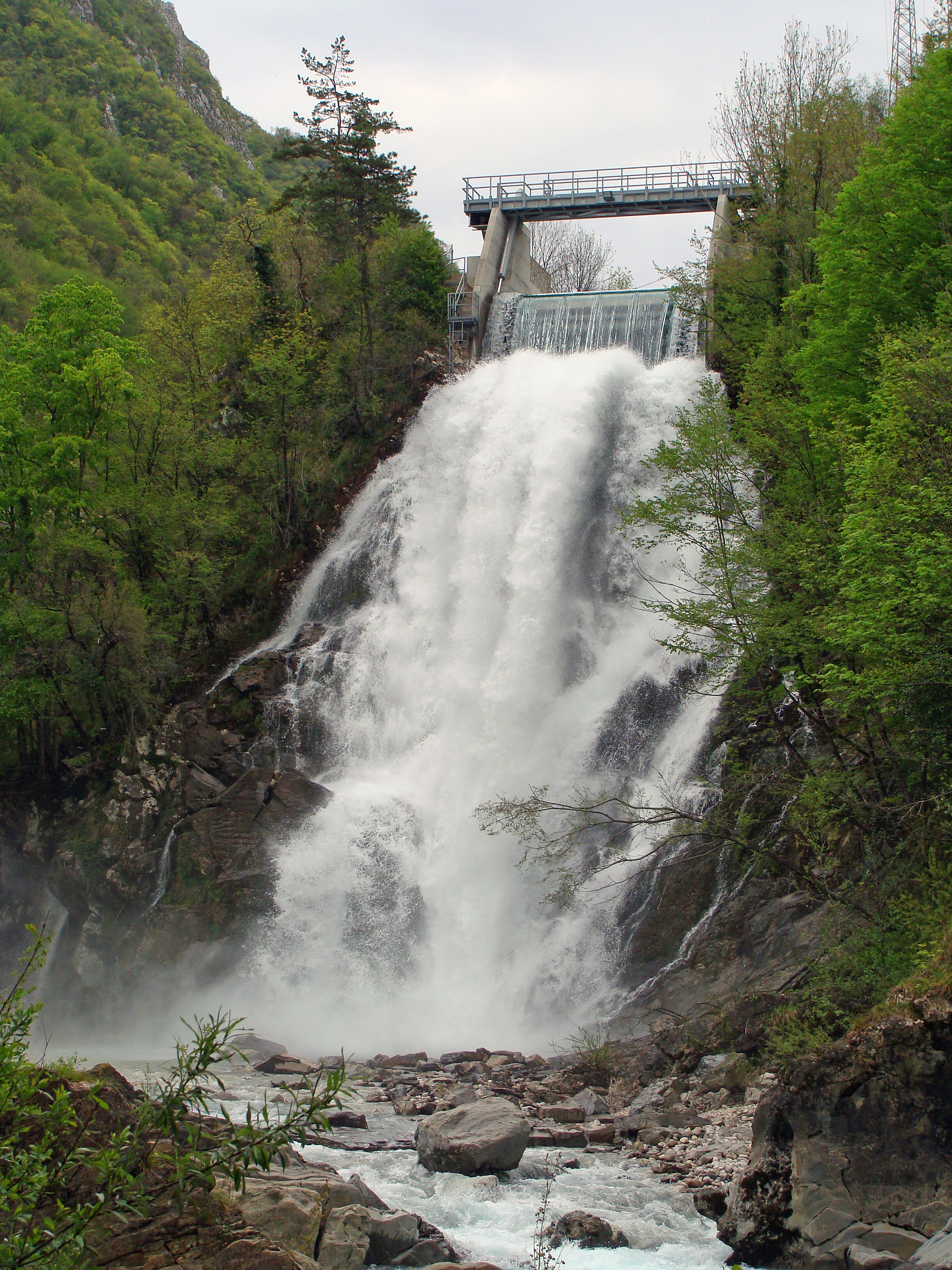 Cascade de Crosis (Tarcento)